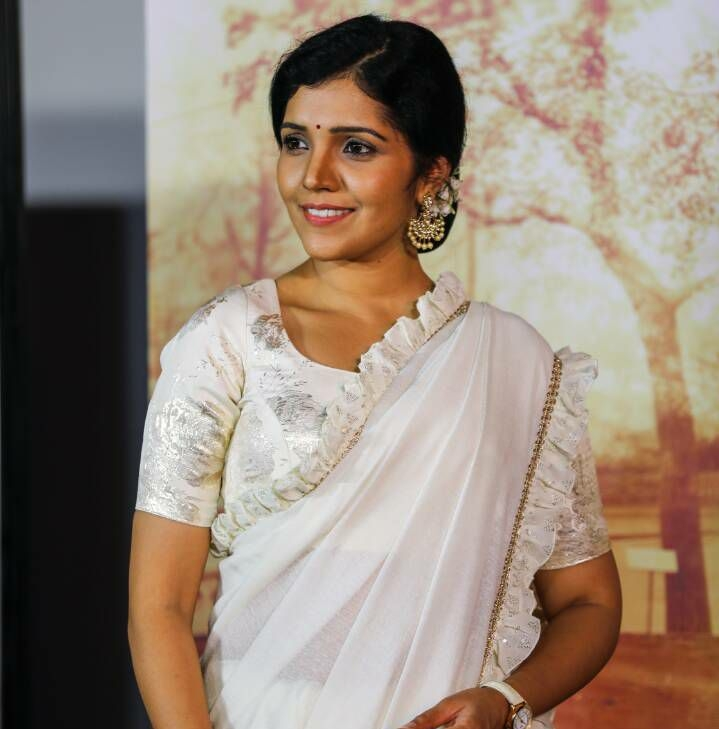 हृदयांतर चित्रपटाच्या ट्रेलर लाँच सोहळ्यातील मुक्ताची प्रसन्न मुद्रा !